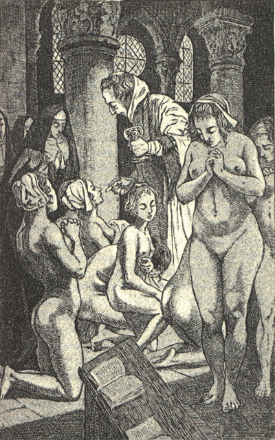 Dessins de Martin van Maële. Illustration de La sorcière, de Jules Michelet. 1911.